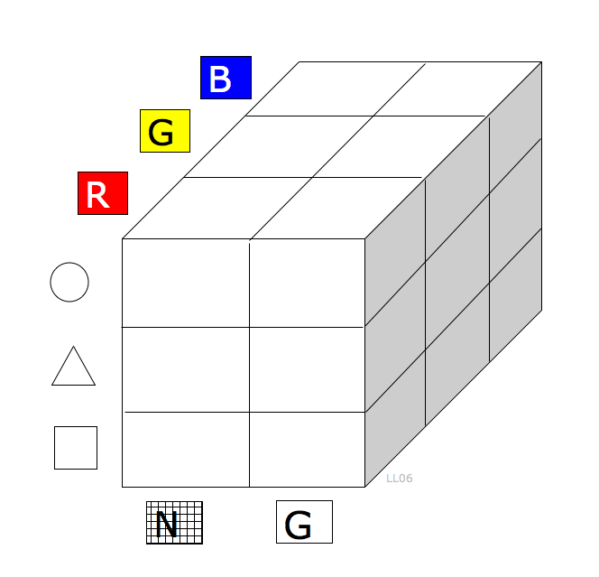 Zwicky kubus. juli 2006 Laurens van Lieshout.